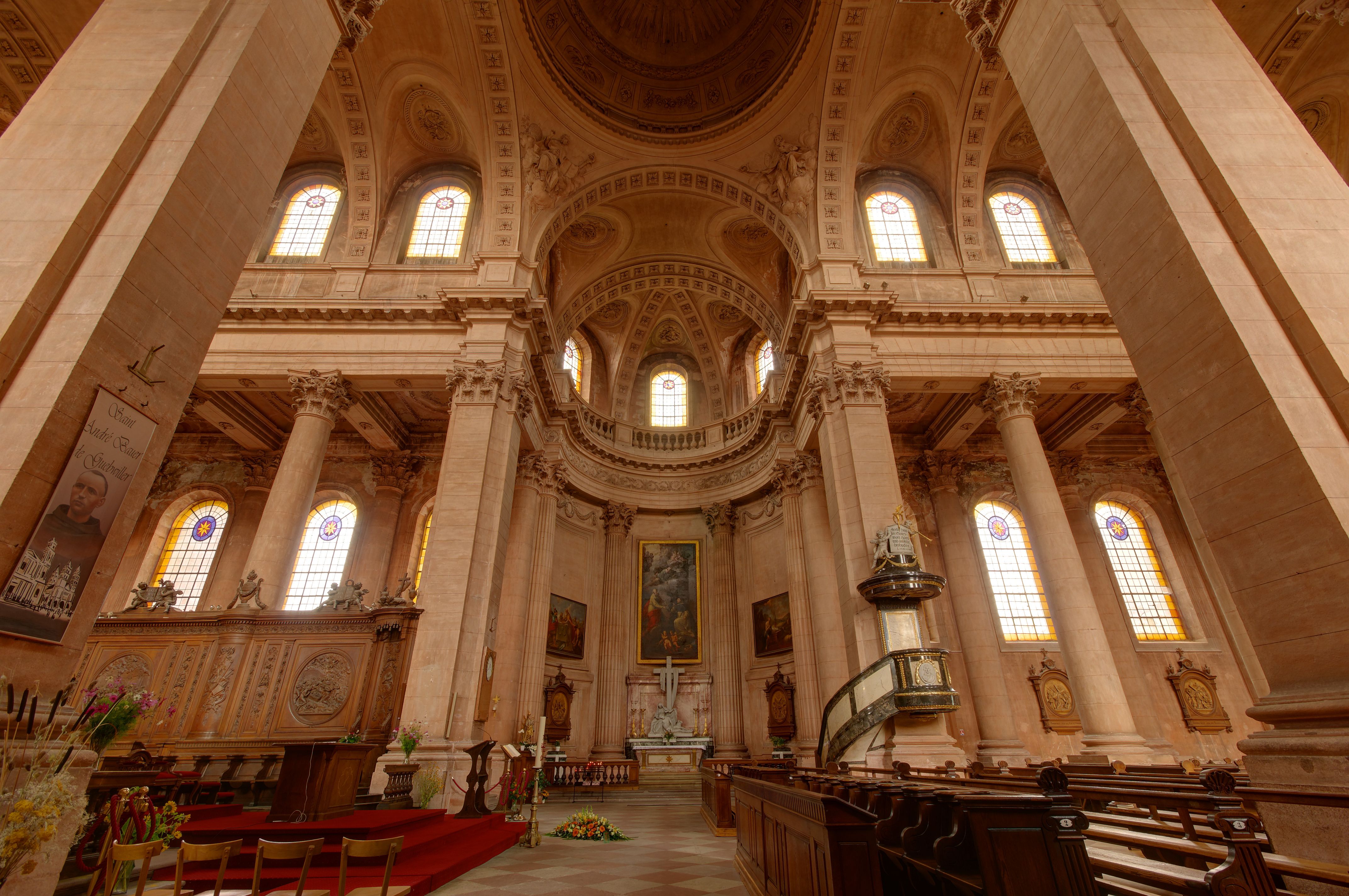 Abbaye de Guebwiller (HDR). Monument classé Monument Historique sous le n° PA00085438.